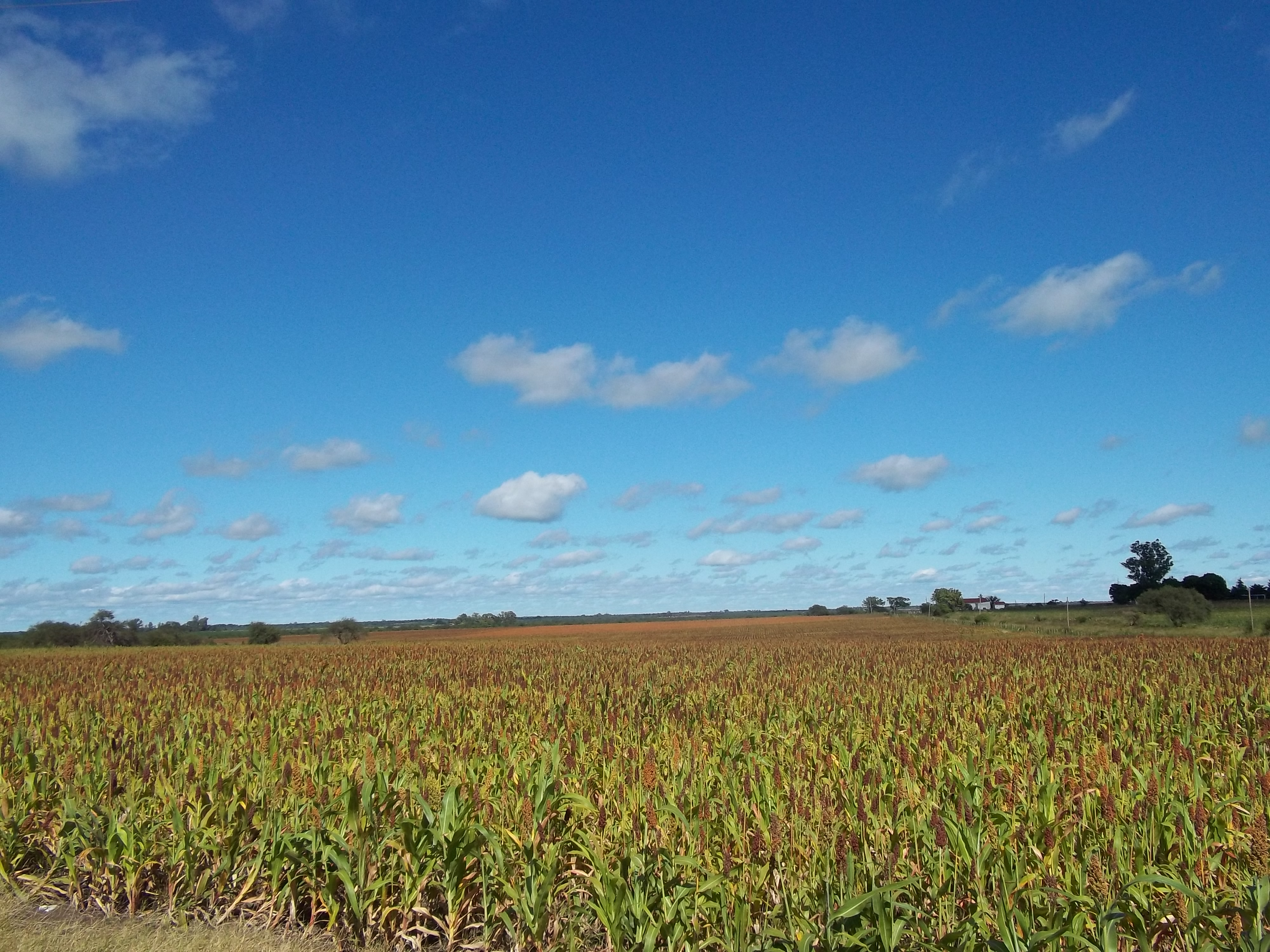 El sorgo en Bovril